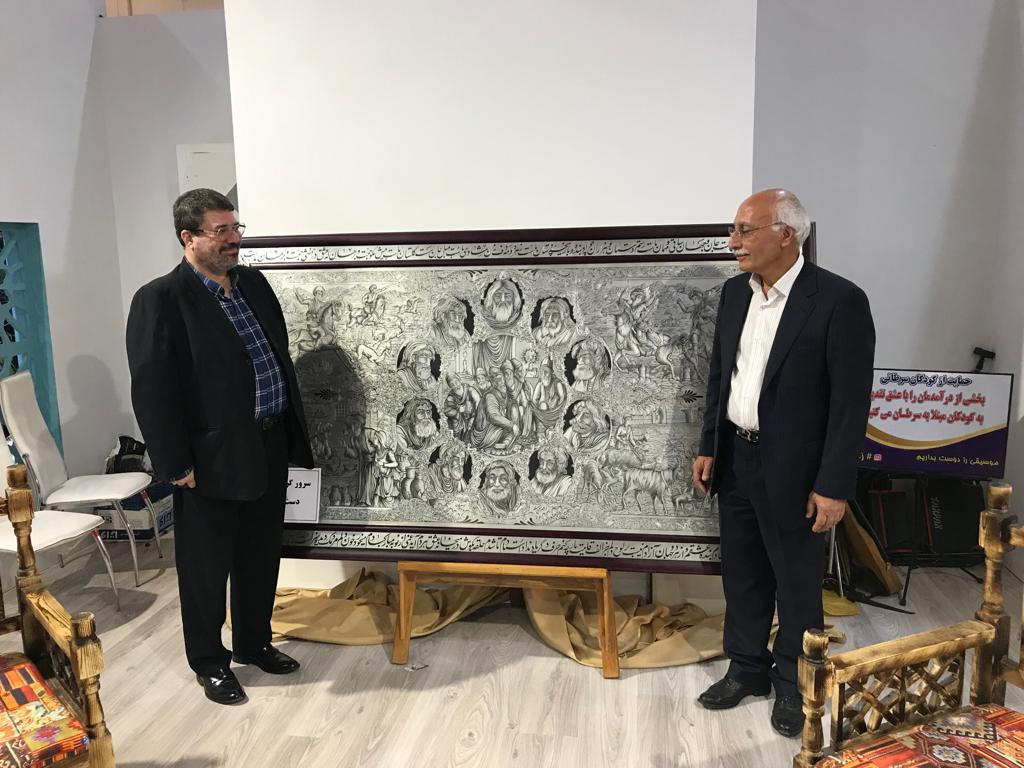 حضور جناب غمخوار در کنار اثر مشاهیر استاد الیاسی